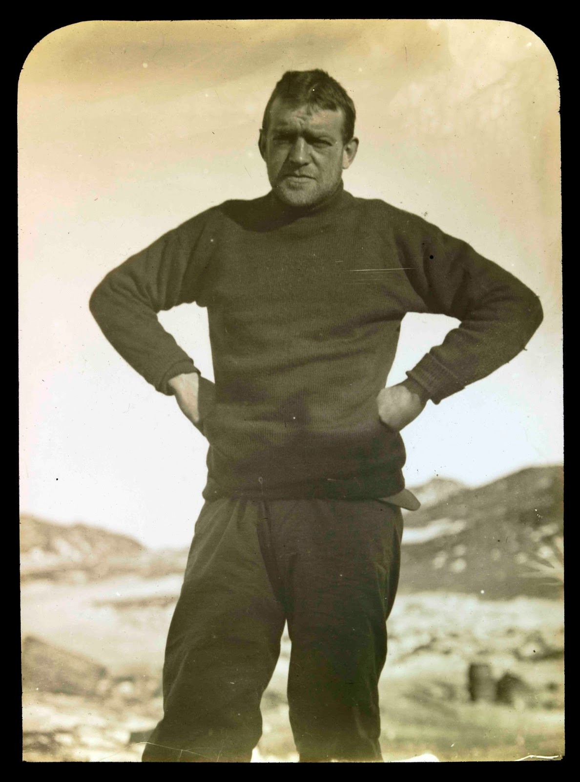 Ernest Shackleton in 1908